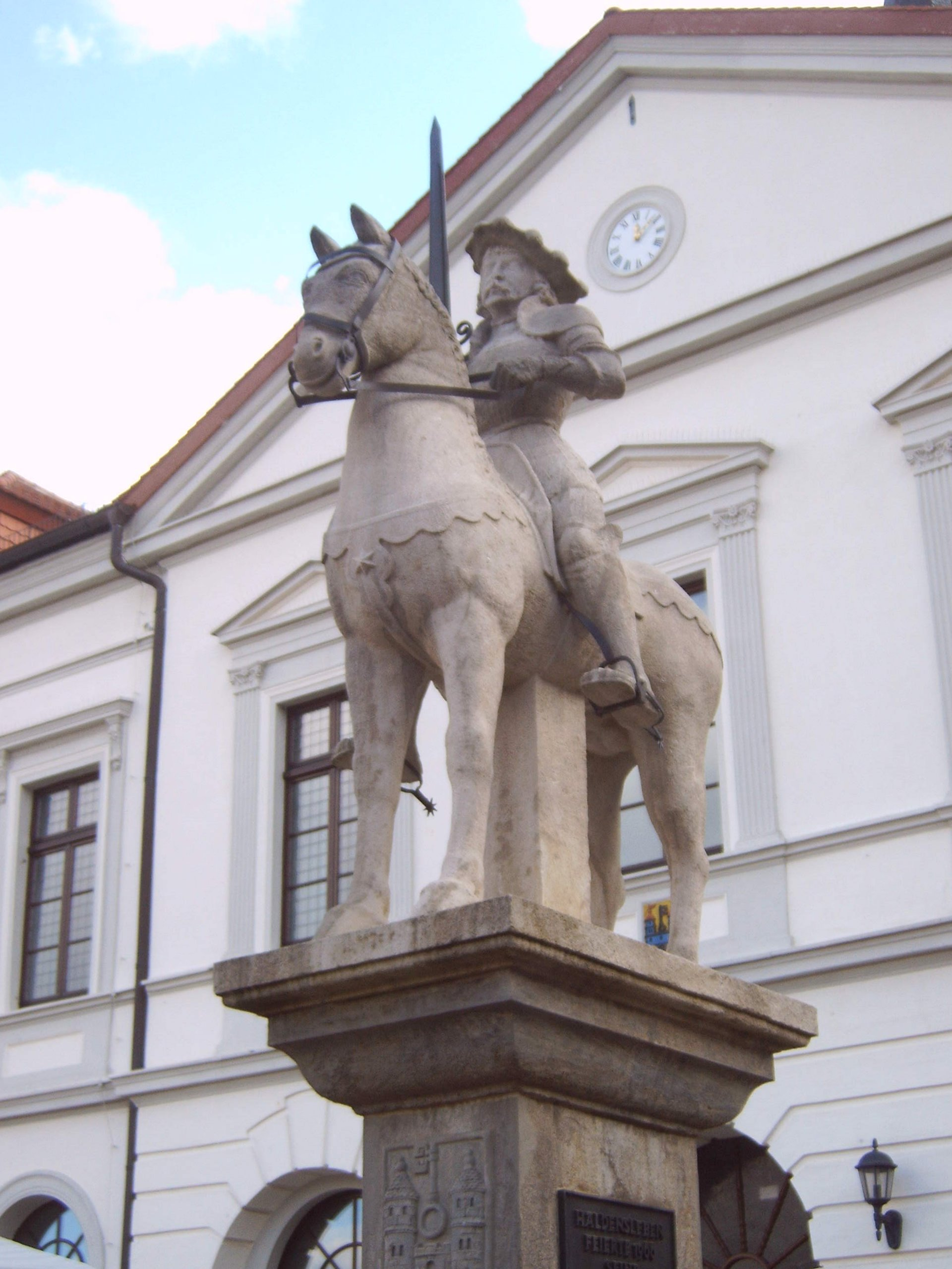 Haldensleber Roland, Sachsen-Anhalt